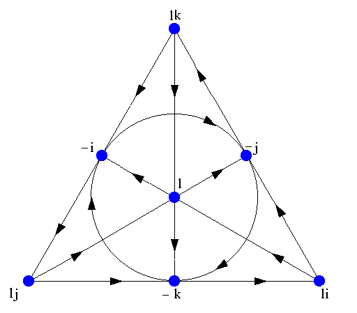 Plan mnémotéchnique de Fano adapté pour les Octonions déployés